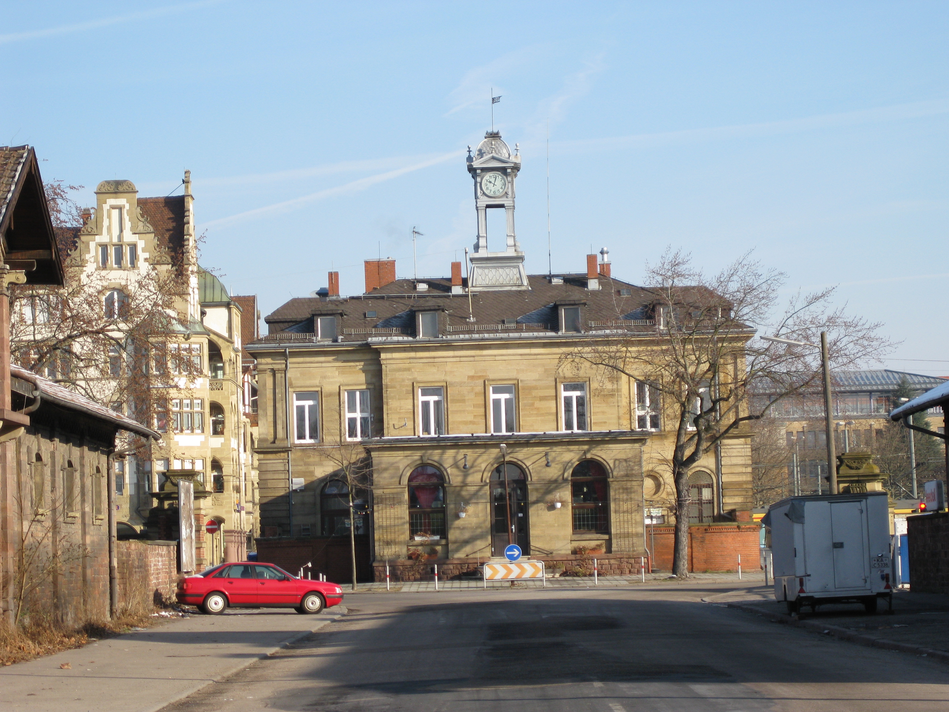 self made photo Schlachthof Karlsruher Oststadt